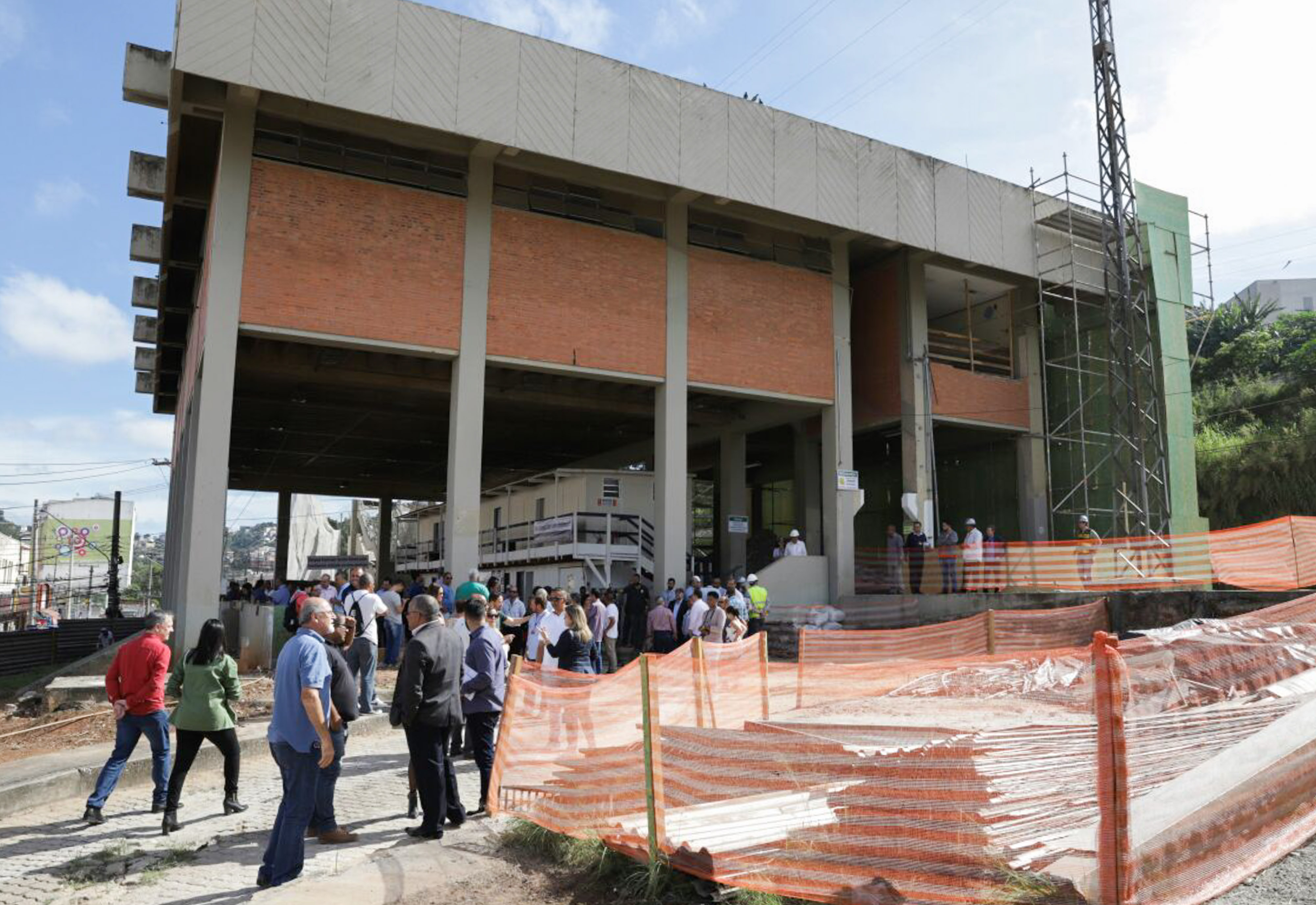 O Governador do Estado de São Paulo, Gerlado Alckmin, participa do Início da segunda etapa das Obras de reforma da Estação de Francisco Morato da CPTM Invest.: R$ 114 milhões.Local: Francisco Morato/SP Data: 17/02/2018 Foto: Governo do Estado de São Paulo